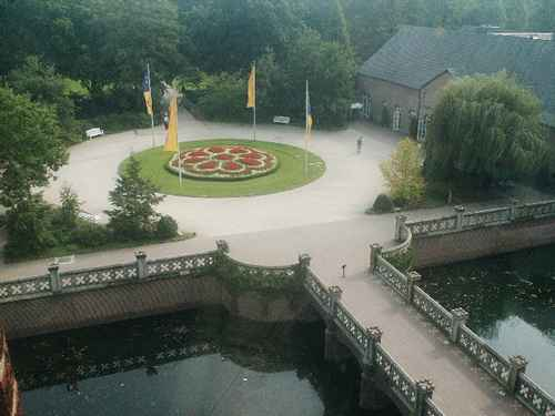 Museum Schloss Moyland, Bedburg-Hau, Germany (Kutschenrondell)